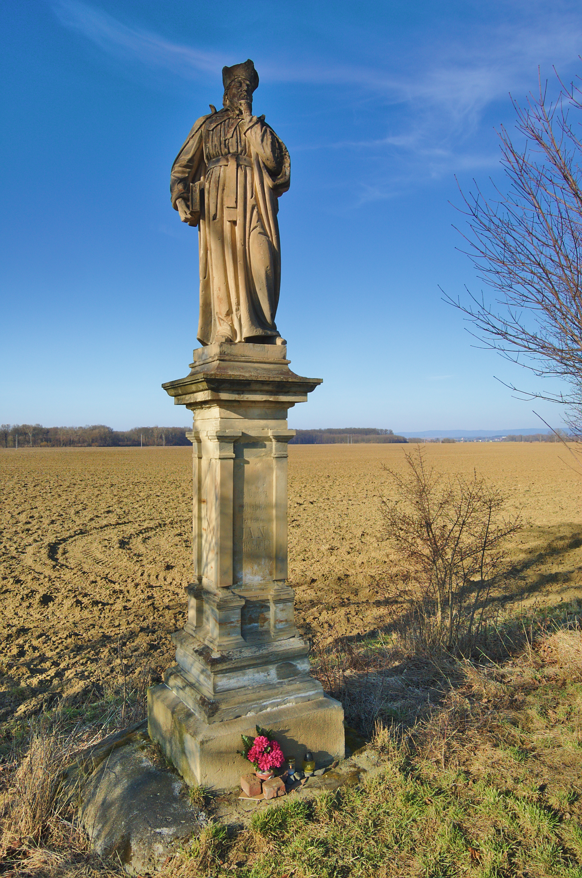 Socha svatého Jana Sarkandera u mostu přes Bečvu u silnice na Troubky, Tovačov, okres Přerov